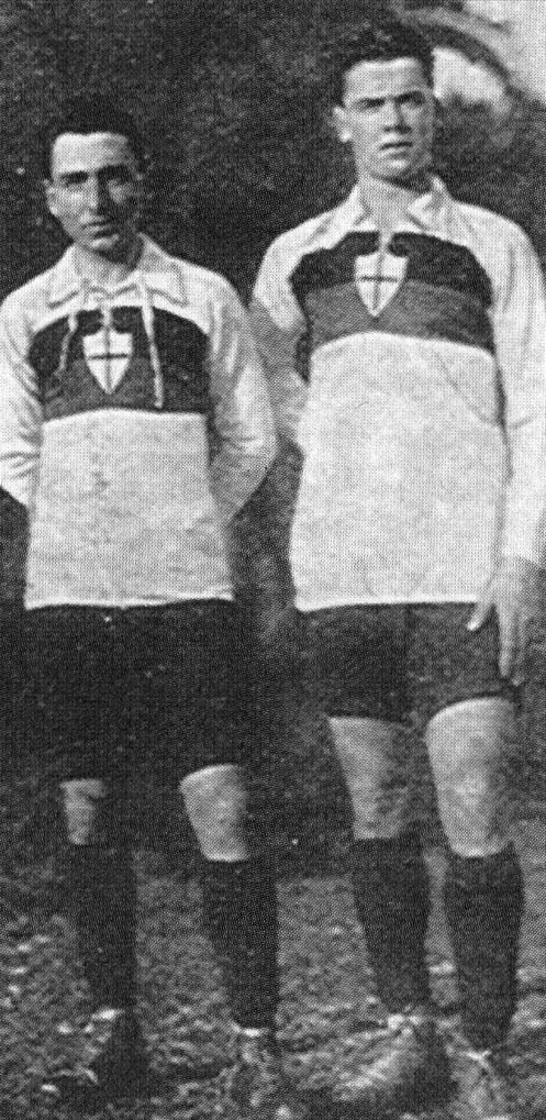 I calciatori italiani Renzo De Vecchi (a sinistra) e Claudio Casanova (a destra) al Genoa nella prima metà degli anni 10 del XX secolo; nell'occasione i giocatori indossano la seconda divisa dell'epoca del club genovese, bianca con fascia rossoblù.